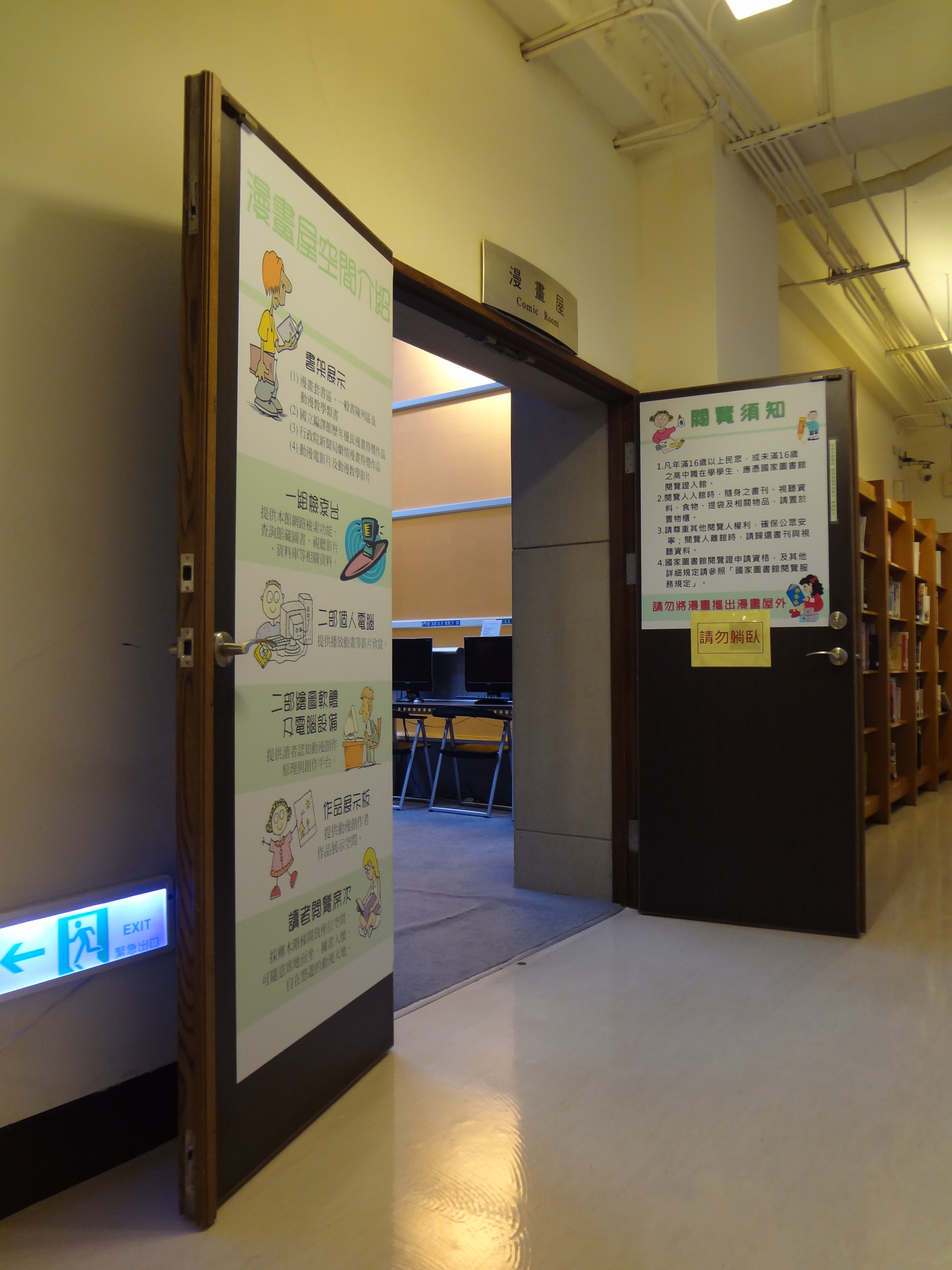 中文（台灣）: 中華民國國家圖書館藝術暨視聽資料中心3樓漫畫屋。